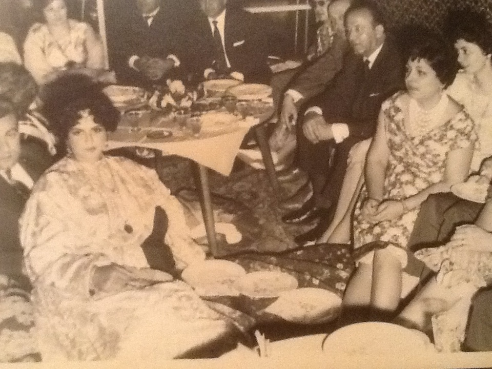 ערב התרמה ברבאט של שנות ה-50 מטעם אגודת הנשים היהודיות במרוקו - A found raising party in Rabat by the Jewish Women Society of Morocco in the 1950's